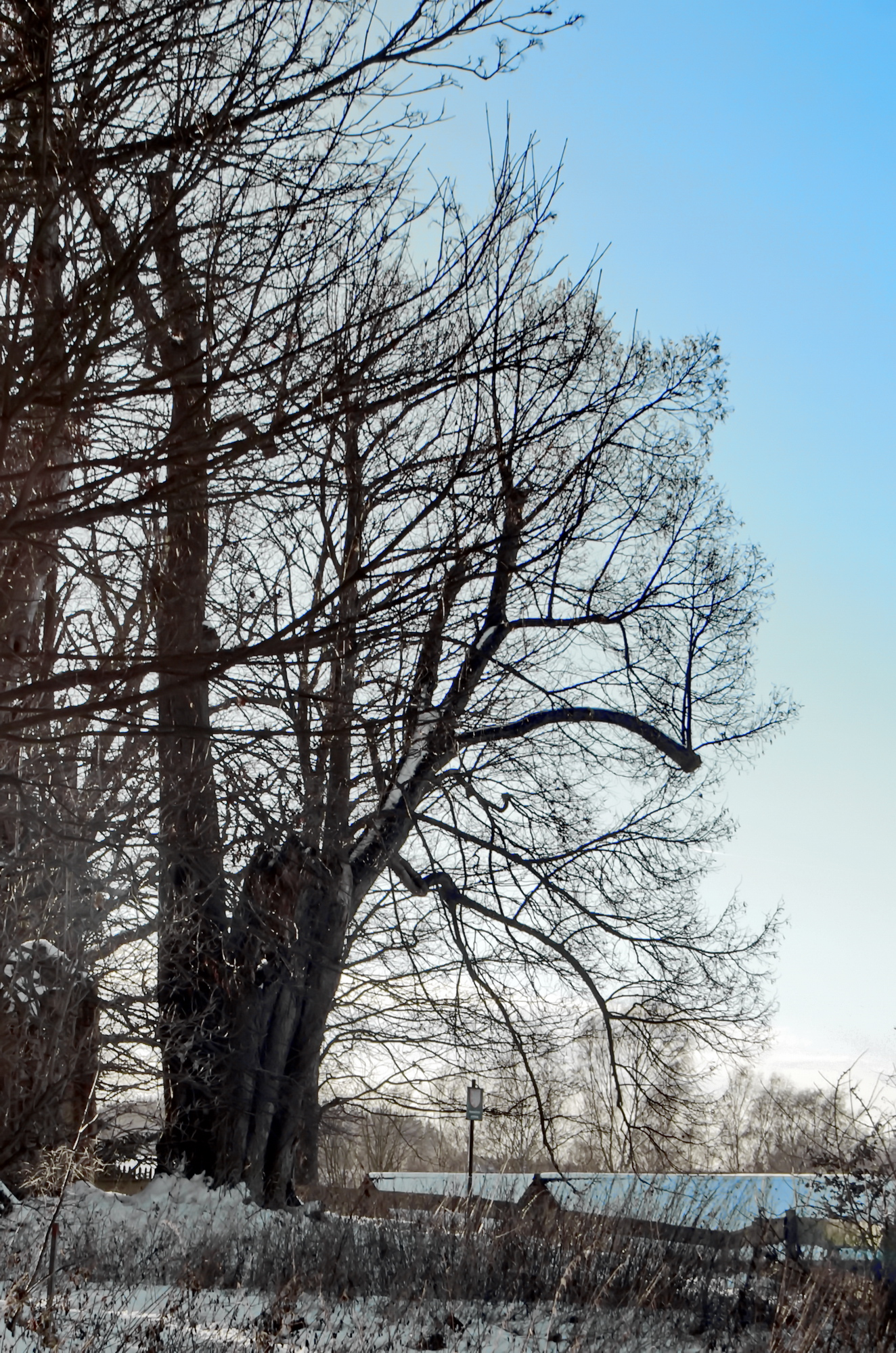 Památný strom Lípa v Kostelní Bříze, Kostelní Bříza, okres Sokolov